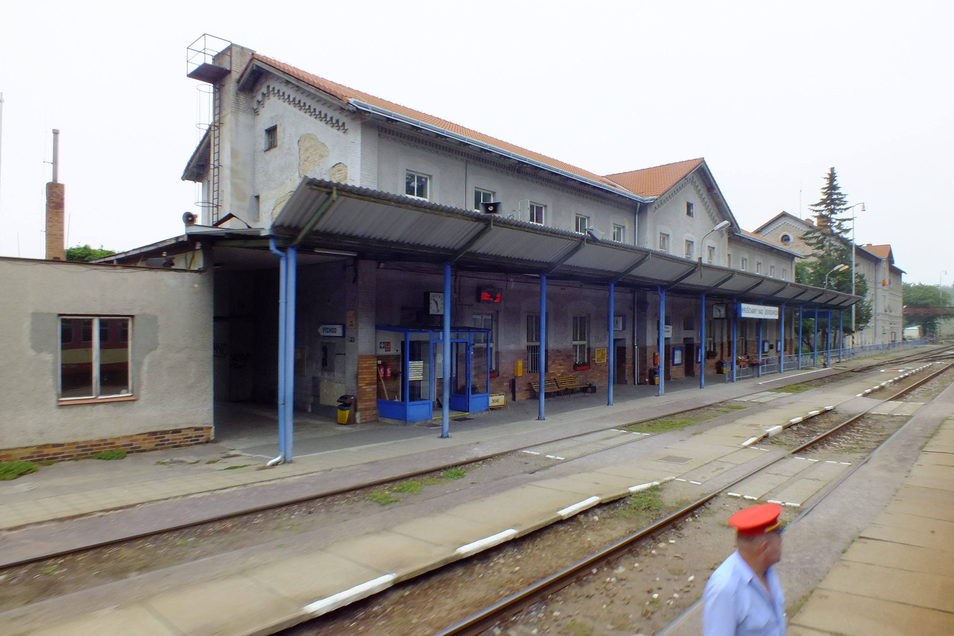 Staniční budova